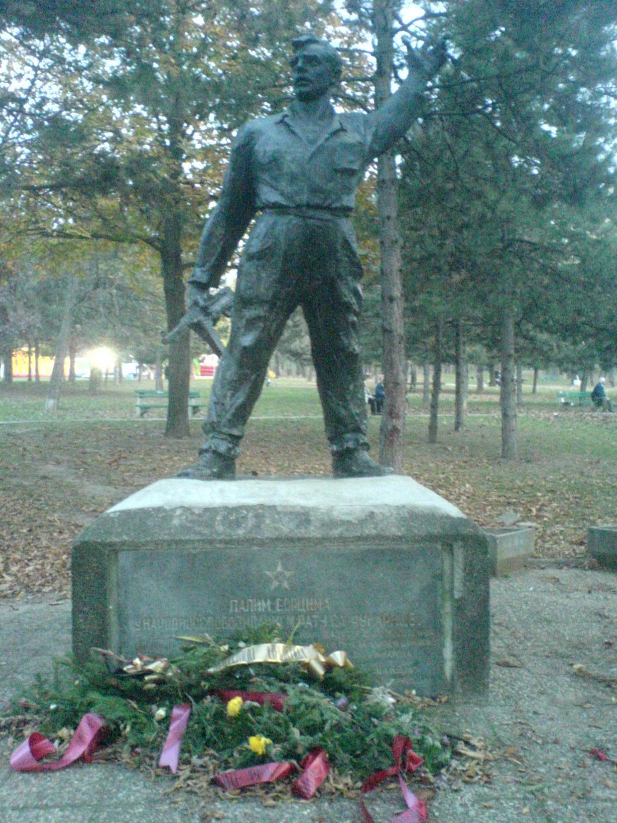 Spomenik palim borcima Cukarice